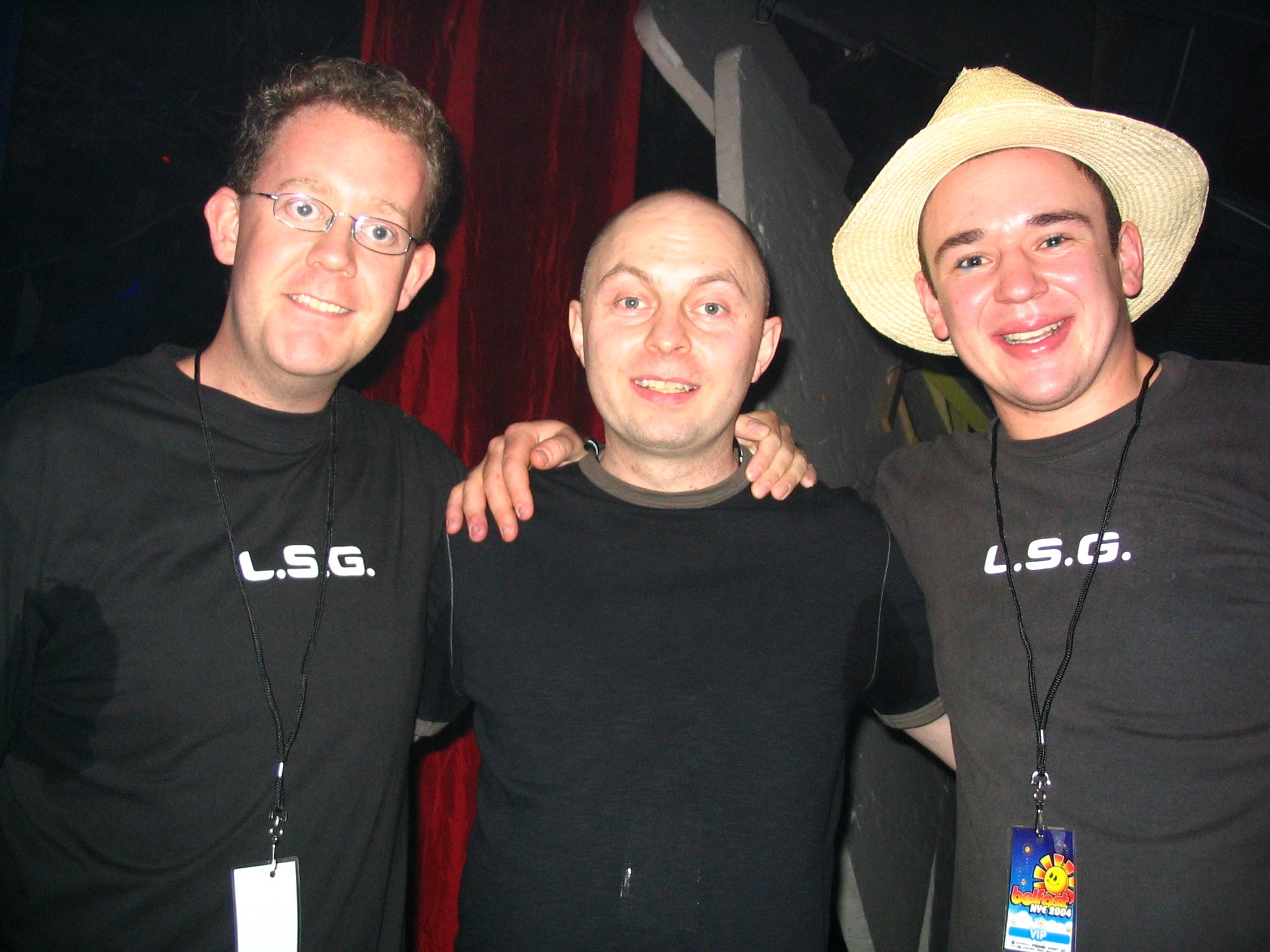 Oliver Lieb